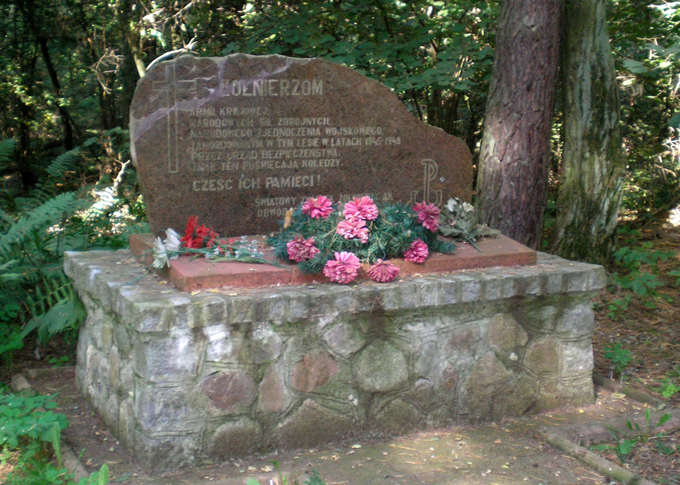 Pomnik upamiętniający mord aparatu bezpieczeństwa na żołnierzach AK, NSZ oraz NZW we wsi Gołoty.